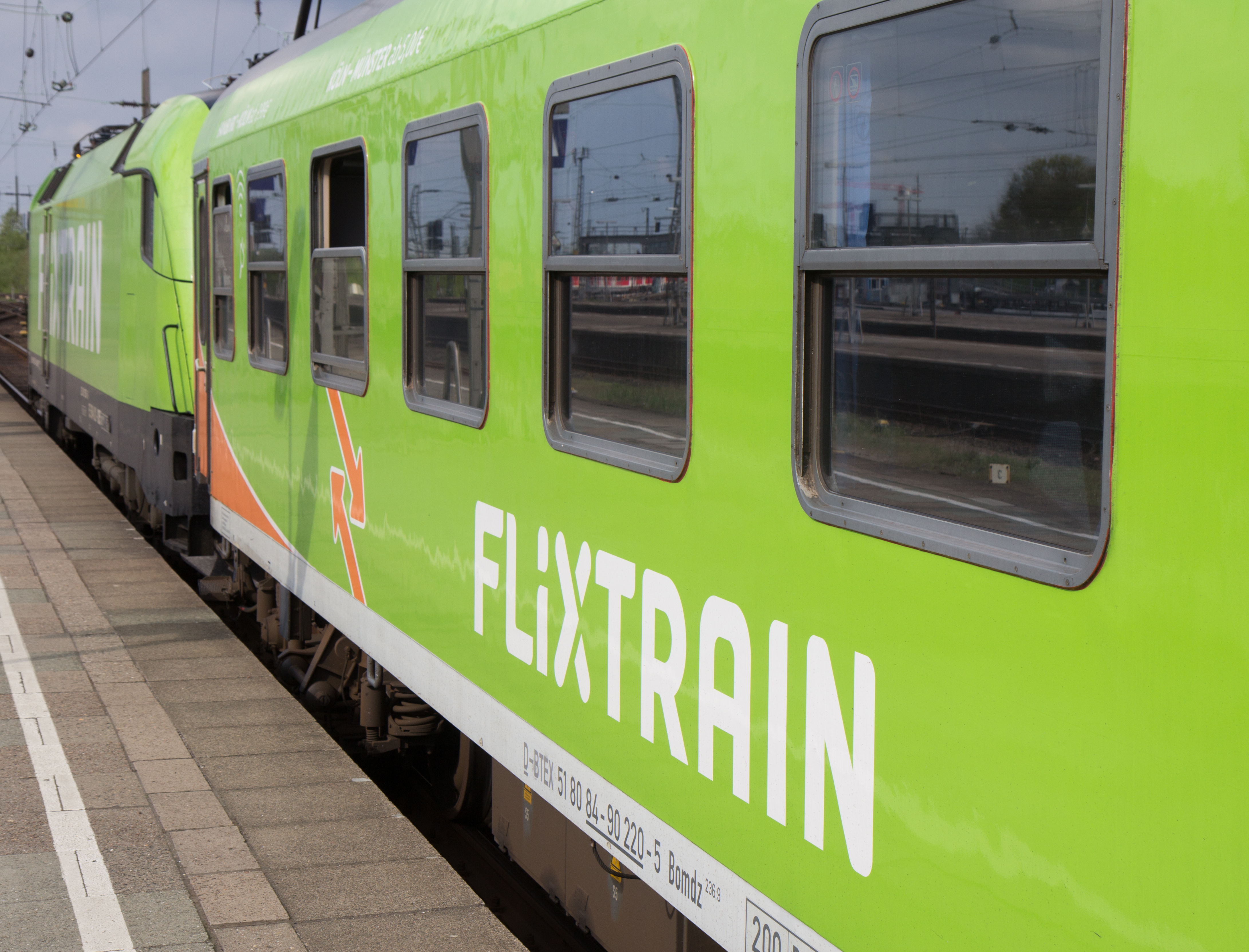 Flixtrain der Flixmobility im Bahnhof Hamburg Altona und auf der Fahrt bis Hamburg Haptbahnhof. Fotoarbeiten mit Akkreditierung der Pressestelle.